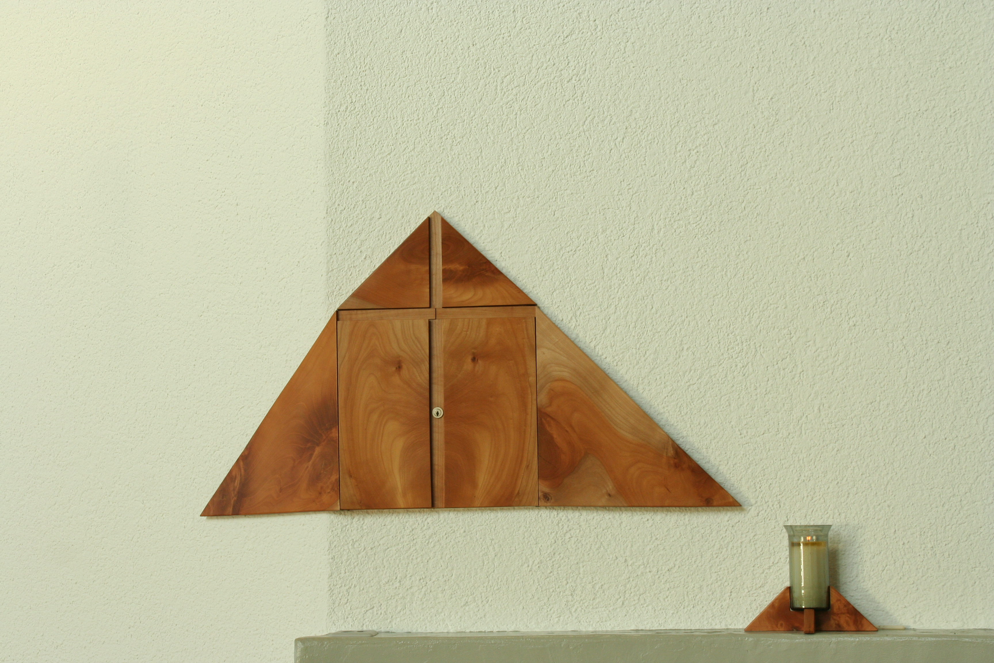 Römisch-katholische Kirche Bruder Klaus Volketswil, Gestaltung von Primo Lorenzetti